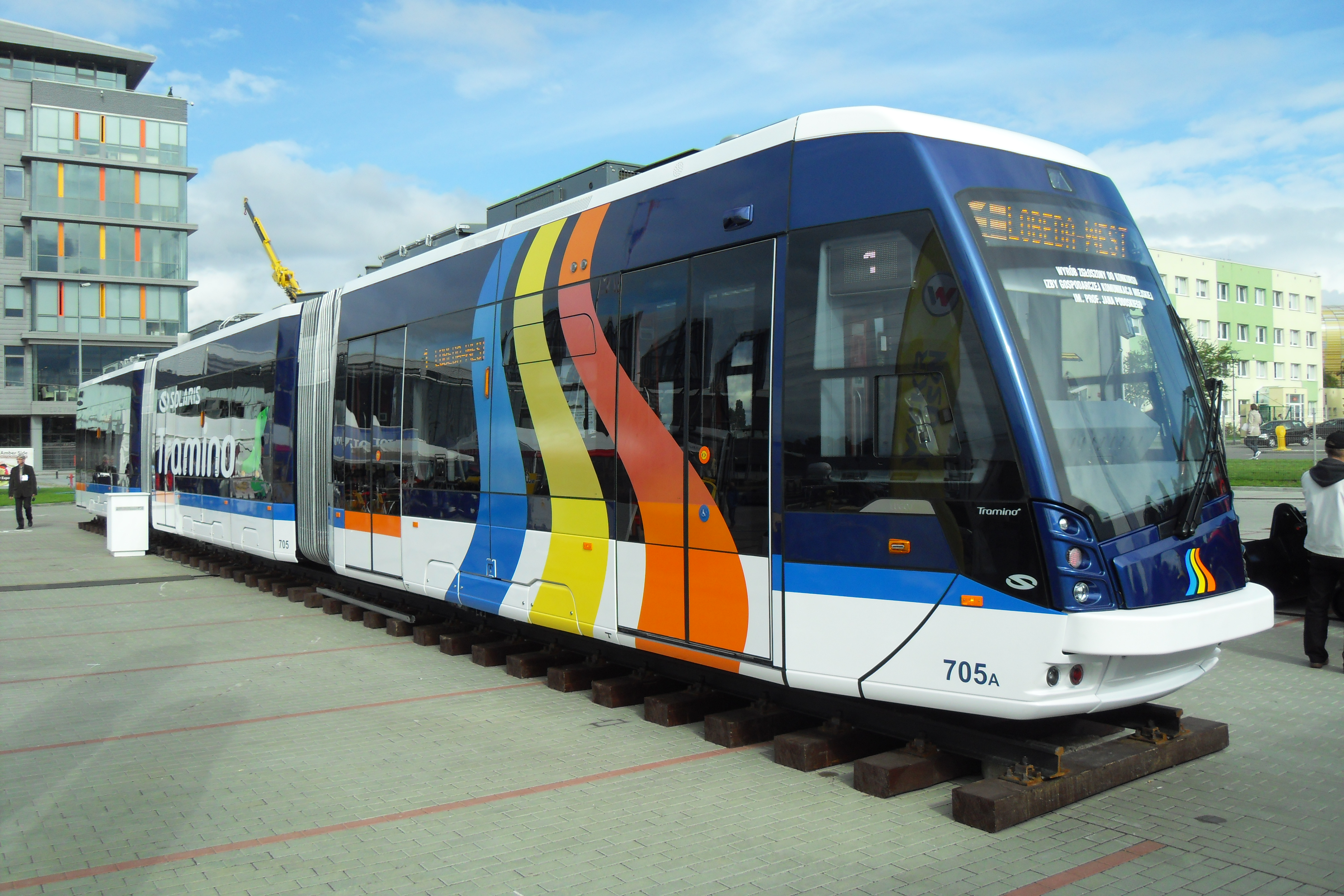 Gdańsk Letnica. TRAKO 2013, tramwaj Solaris Tramino Jena.